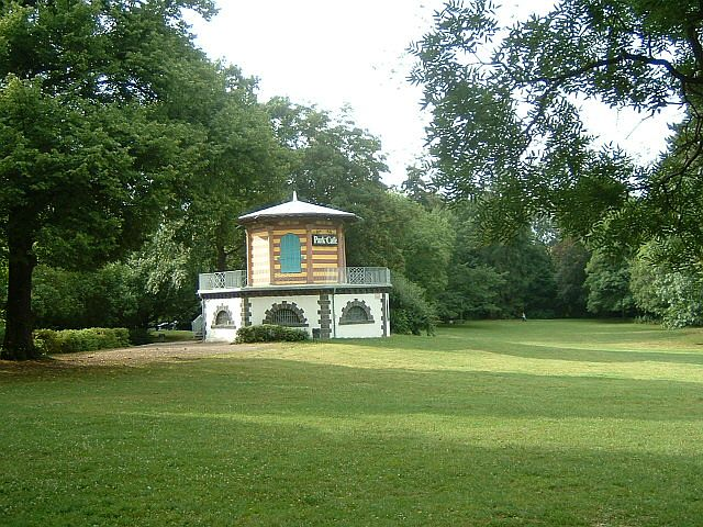 Pavillon im Grüneburgpark in Frankfurt am Main, achteckiger klassizistisches Gebäude, auch genannt Schönhof-Pavillon, heute ist darin ein Café